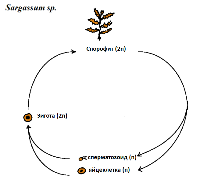 Диплофазный жизненный цикл саргассовых водорослей